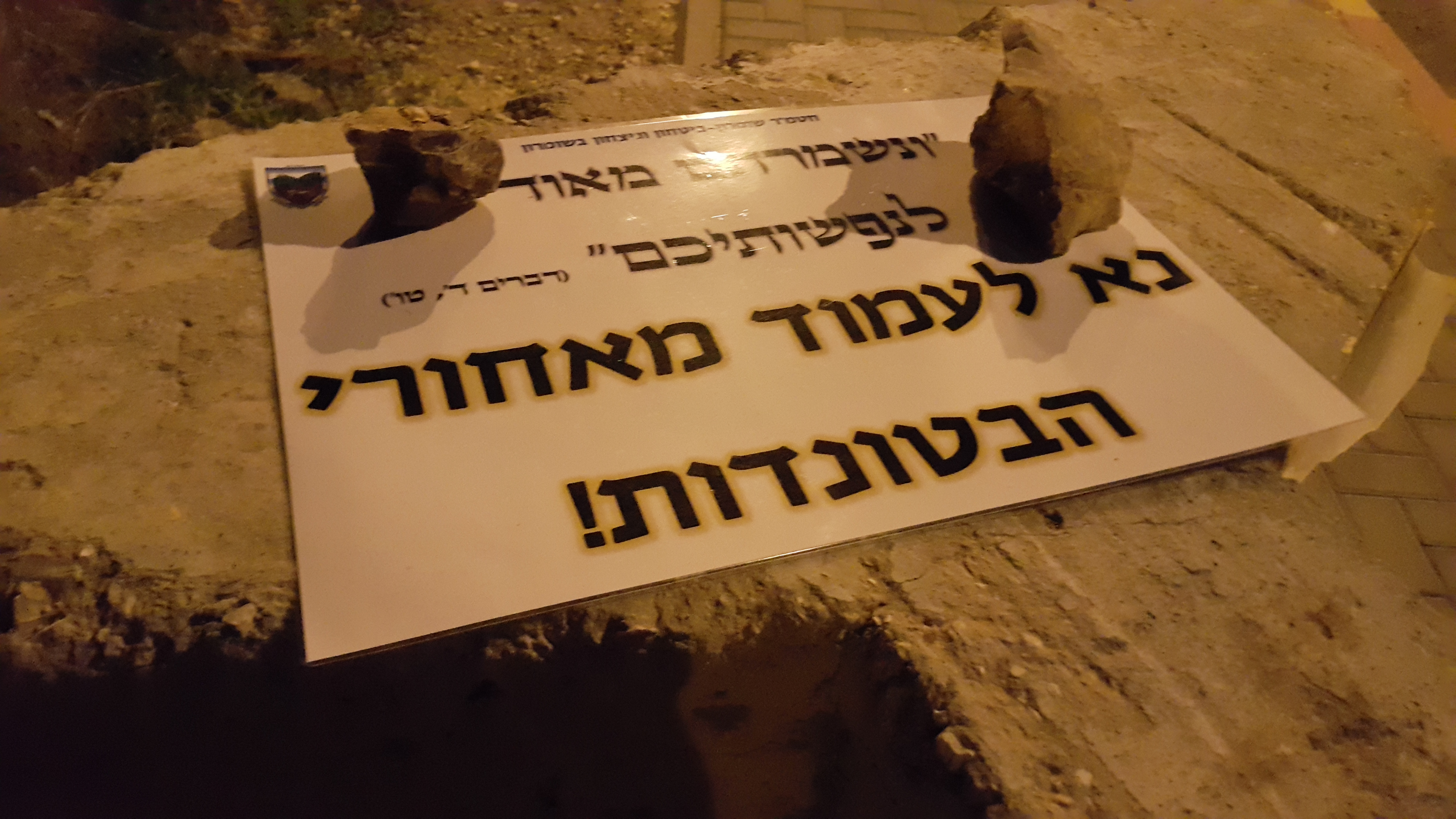 בטונדה בצומת בשומרון